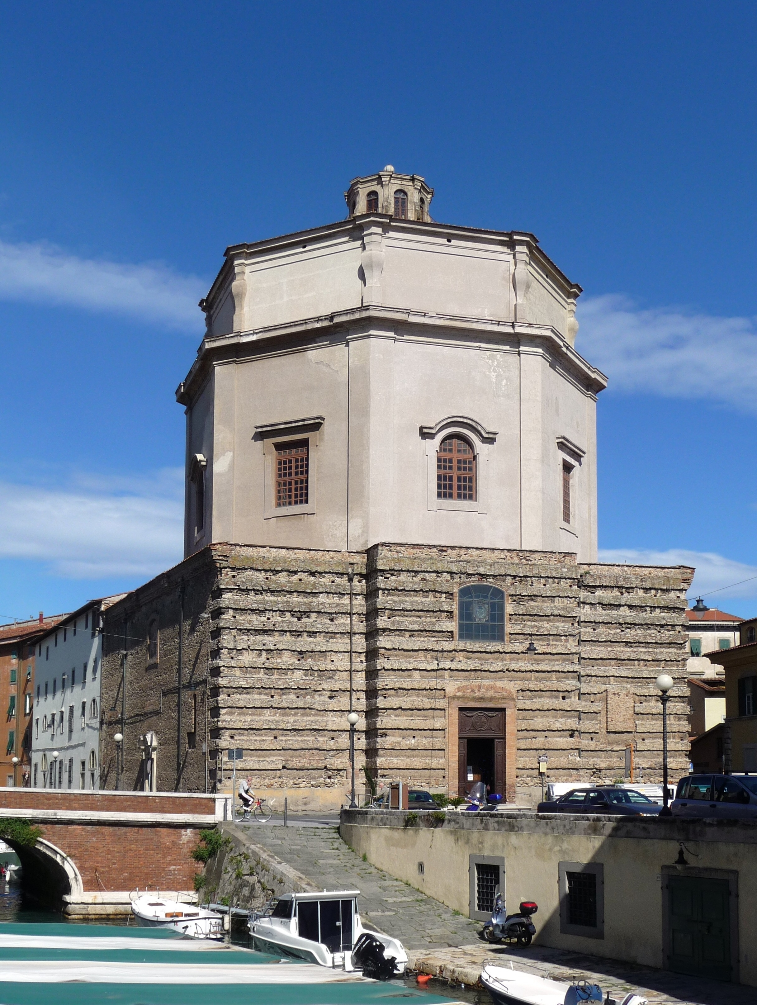 Chiesa di Santa Caterina, Livorno